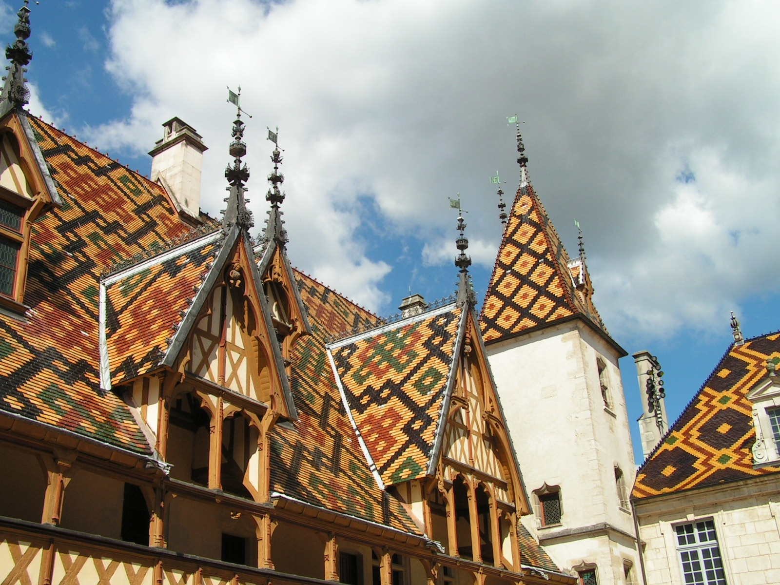 Cour intérieure de l'Hôtel Dieu (Hospices de Beaune) à Beaune (Côte d'Or en Bourgogne - France)